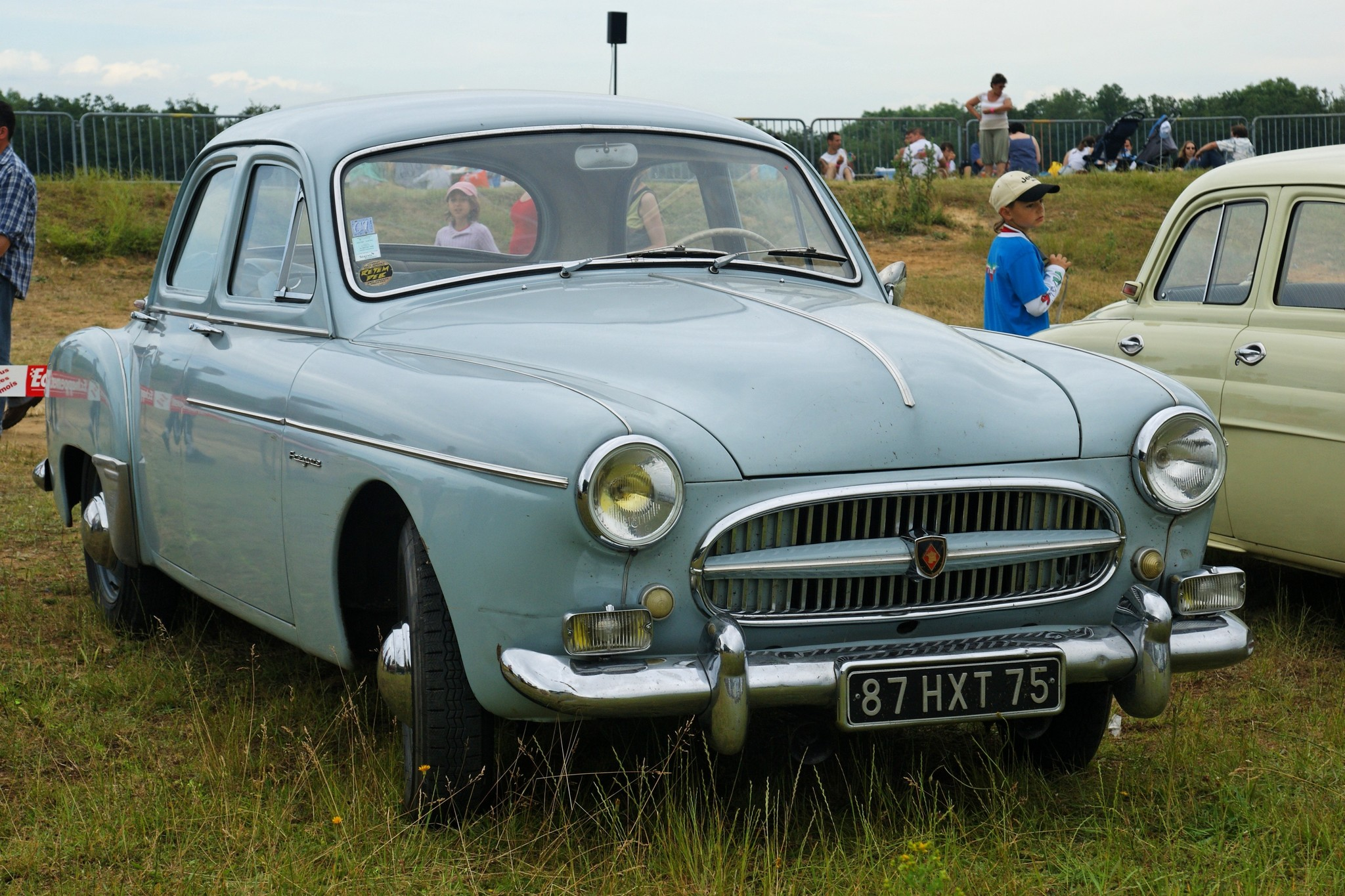 Renault Frégate.